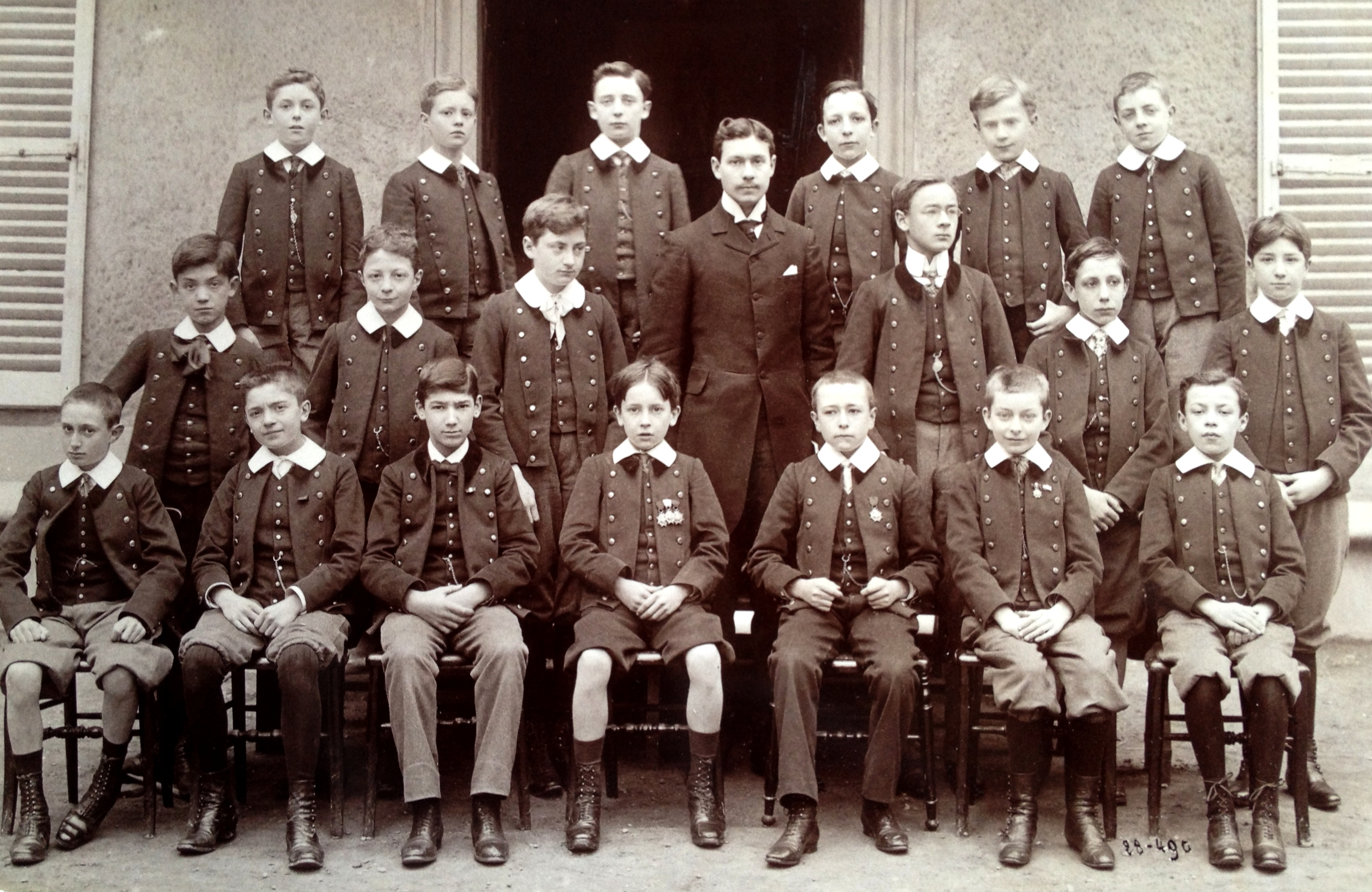 Groupe d'élève du collège Saint-Louis-de-Gonzague, vers 1900. Photographe non déterminé (De Jongh frères ?).